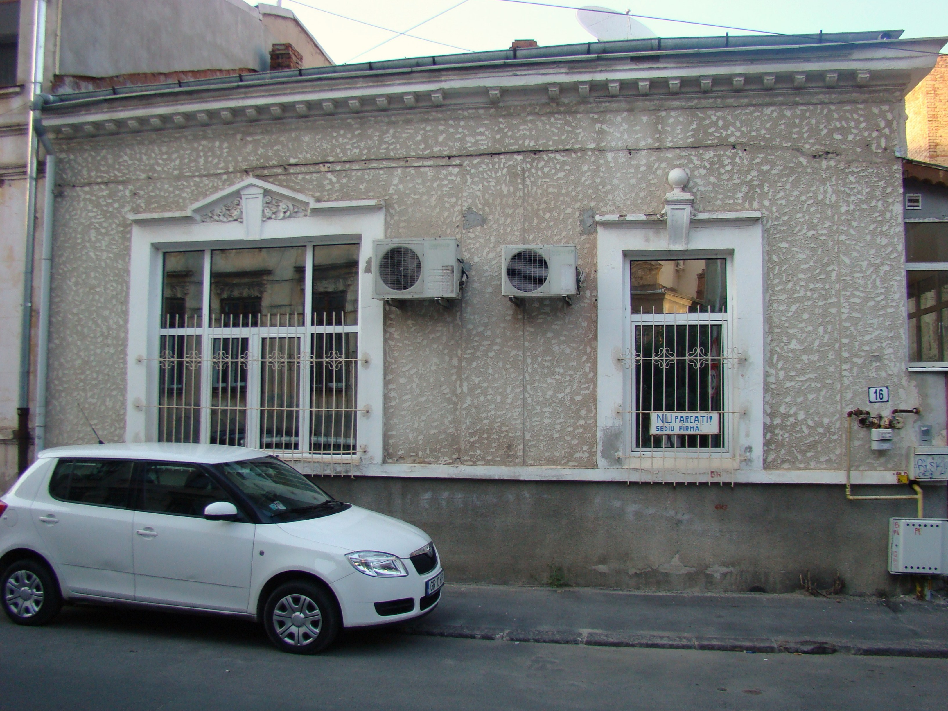 Casă monument istoric, str. Theodor Aman, nr.16